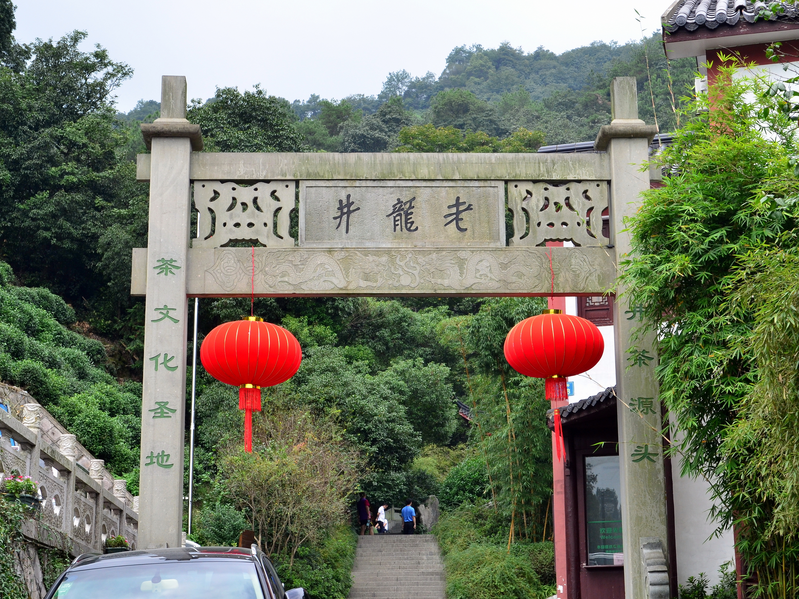 杭州西湖龙井狮峰山麓老龙井景区。